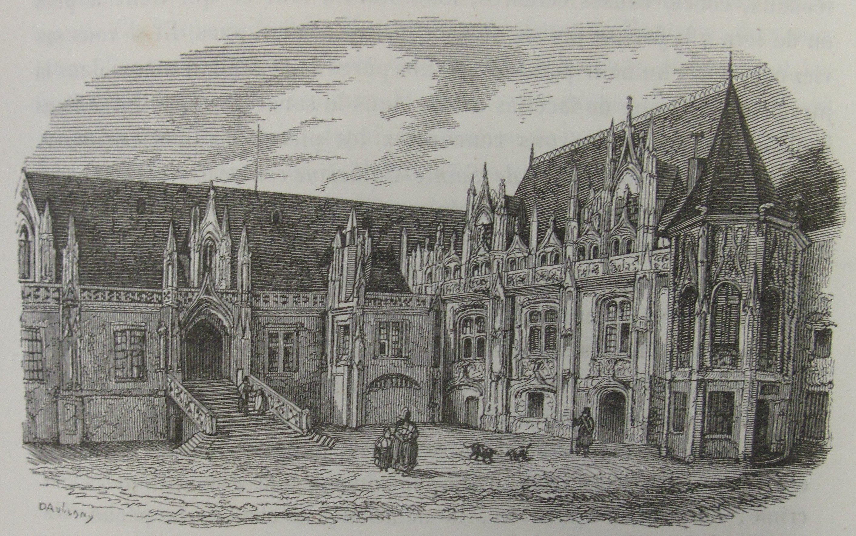 La Normandie par M. Jules Janin, illustrée par MM Morel-Fatio, Tellier, Gigoux, Daubigny, Debon, H. Bellangé, Alfred Johannot. Paris, Ernest Bourdin, éditeur, Rue de Seine, 51.] This is a faithful photographic reproduction of a two-dimensional, public domain work of art. The work of art itself is in the public domain for the following reason: This work is in the public domain in its country of origin and other countries and areas where the copyright term is the author's life plus 100 years or less. This work is in the public domain in the United States because it was published (or registered with the U.S. Copyright Office) before January 1, 1924. This file has been identified as being free of known restrictions under copyright law, including all related and neighboring rights. The official position taken by the Wikimedia Foundation is that "faithful reproductions of two-dimensional public domain works of art are public domain".This photographic reproduction is therefore also considered to be in the public domain in the United States. In other jurisdictions, re-use of this content may be restricted; see Reuse of PD-Art photographs for details.